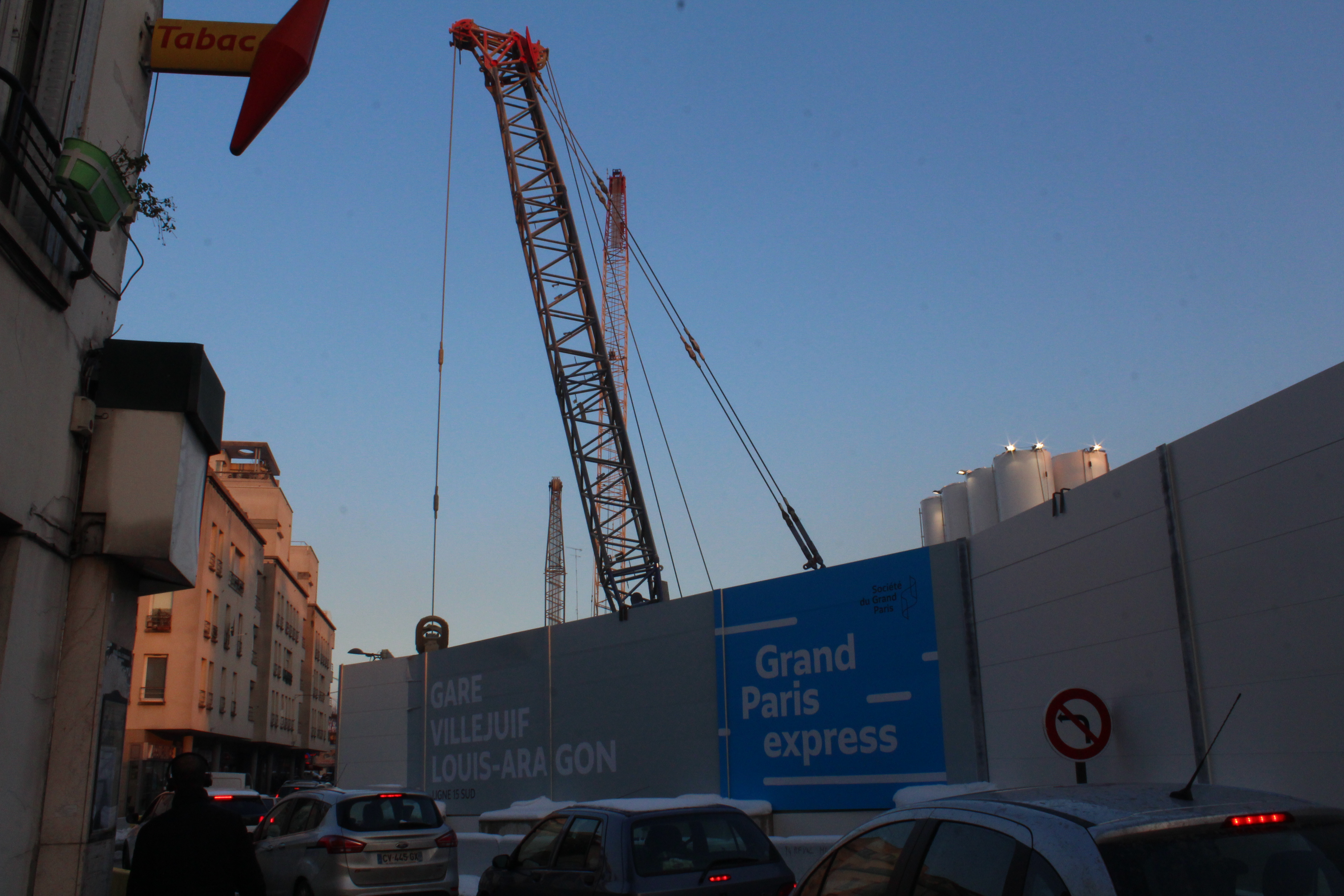 Chantier autour de la station Villejuif - Louis Aragon, ligne 15 du métro de Paris.